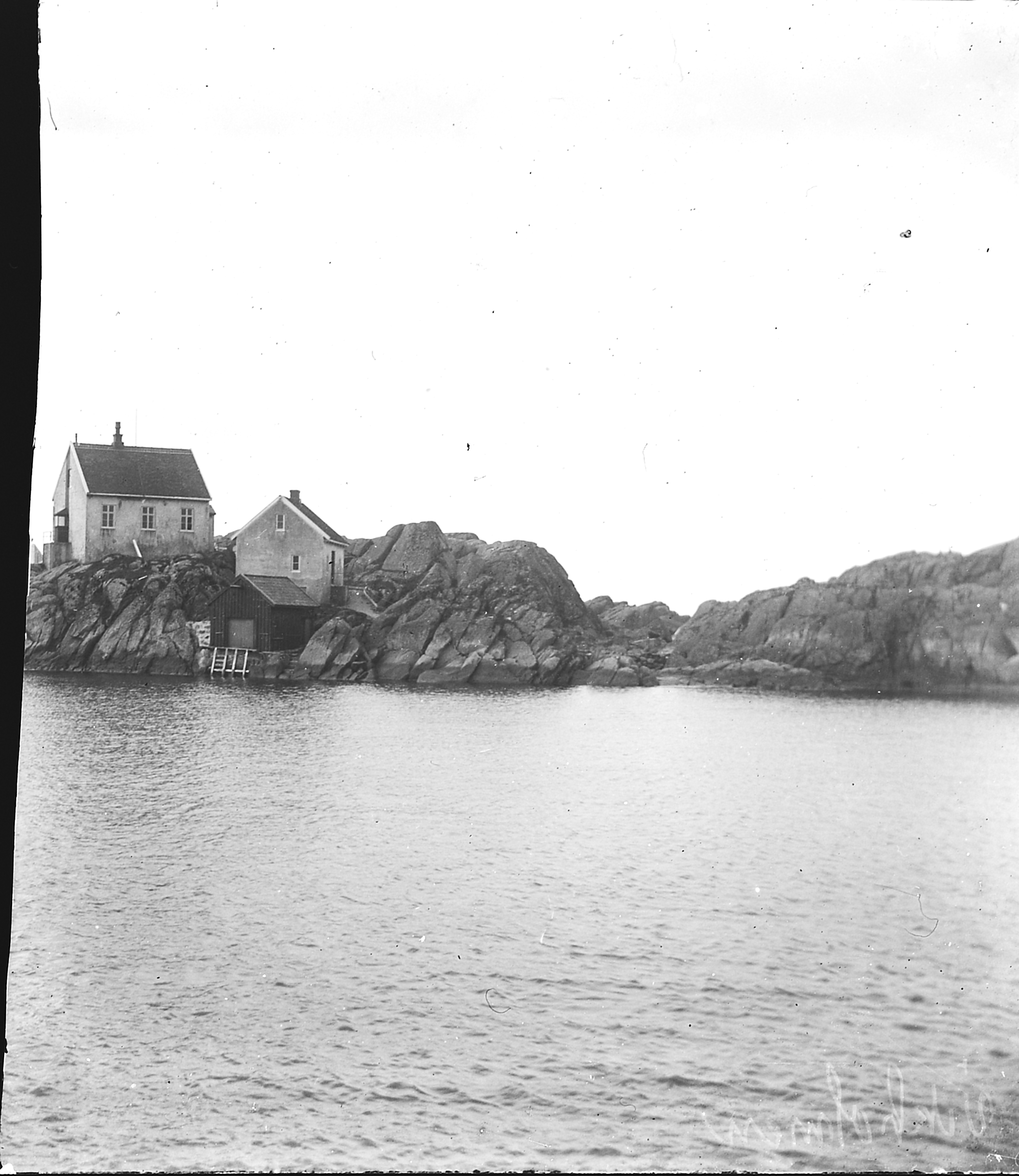 Bildet er hentet fra Arkivverket. Vikaholmen, Karmøy Arkivinstitusjon : Riksarkivet Arkivnavn : Fyrdirektoratet Sted : Norge, Rogaland, Karmøy, Emneord: Fyr, Kyst Avbildet